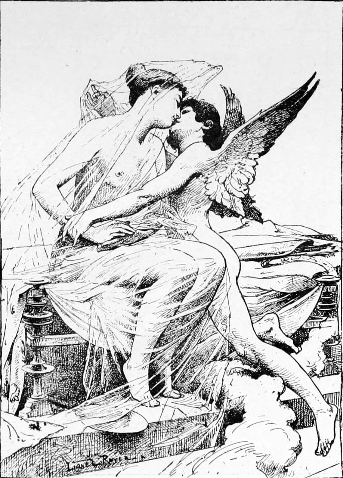 L'Amour et Psyché